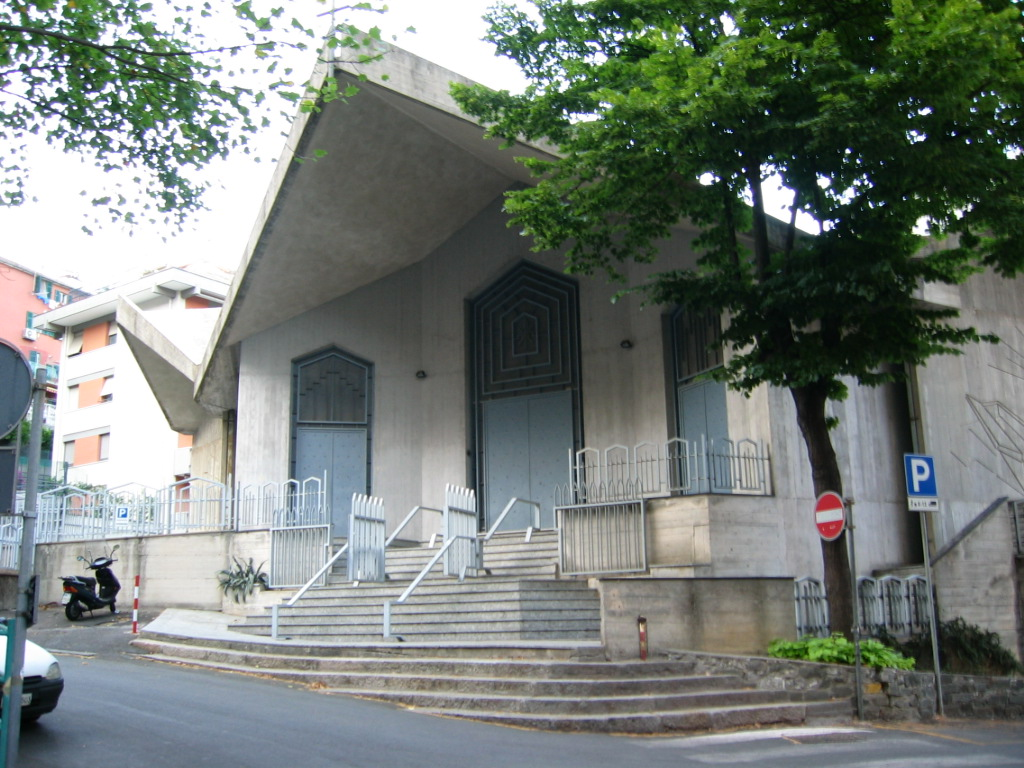 Chiesa parrocchiale della Risurrezione di Nostro Signore Gesù Cristo in Borgoratti (Genova)